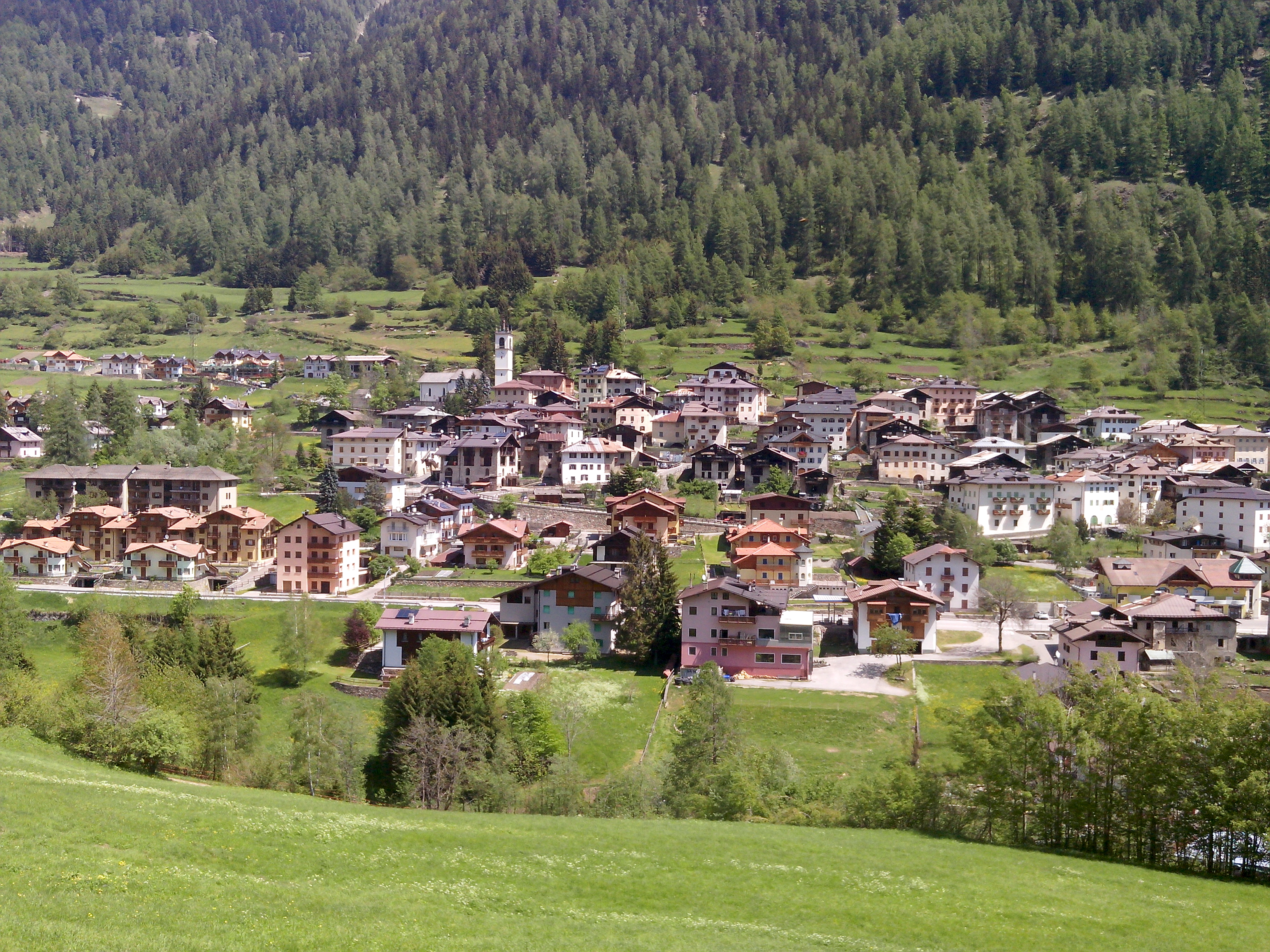 Autore: Fiato Fonte: Opera propria Descrizione: Abitato di Celledizzo visto dalla ciclabile della Val di Sole Data: 21.05.2014 Licenza